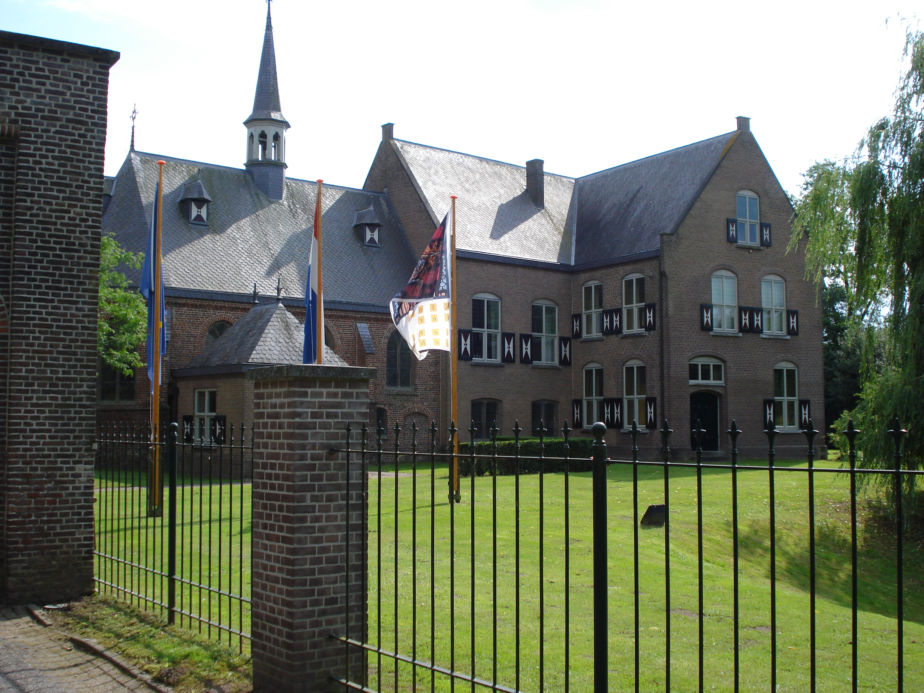 Haaren, "Huize Haarendael", Klooster Bethlehem van de Zusters Franciscanessen Penitenten (ancien couvent Bethlehem)